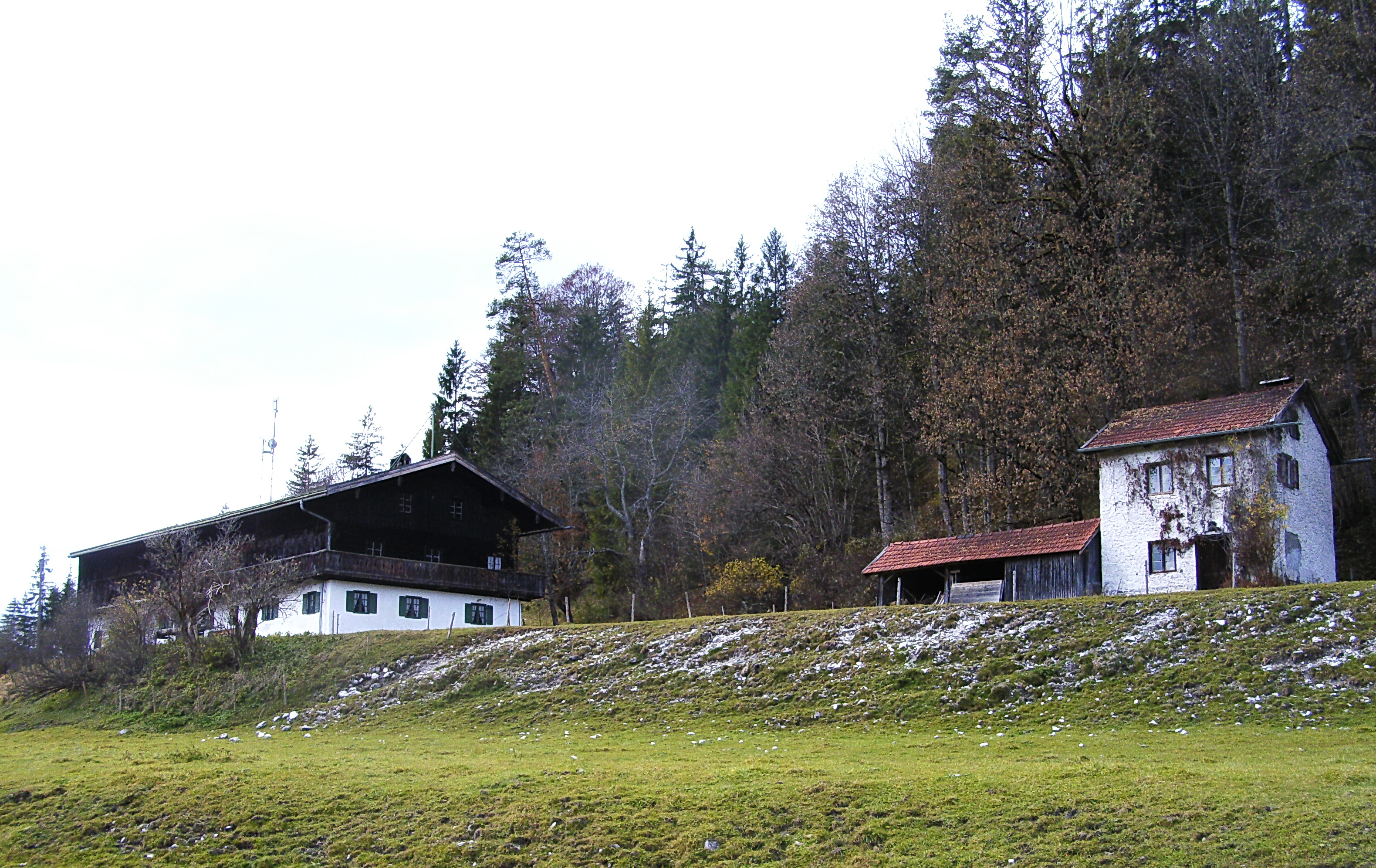 Der Einödhof "Ochsensitz" im Isartal Nähe Vorderriss, aber mit HsNr. 60 zu Jachenau gehörig; links der Hof, rechts die alte Schmiede